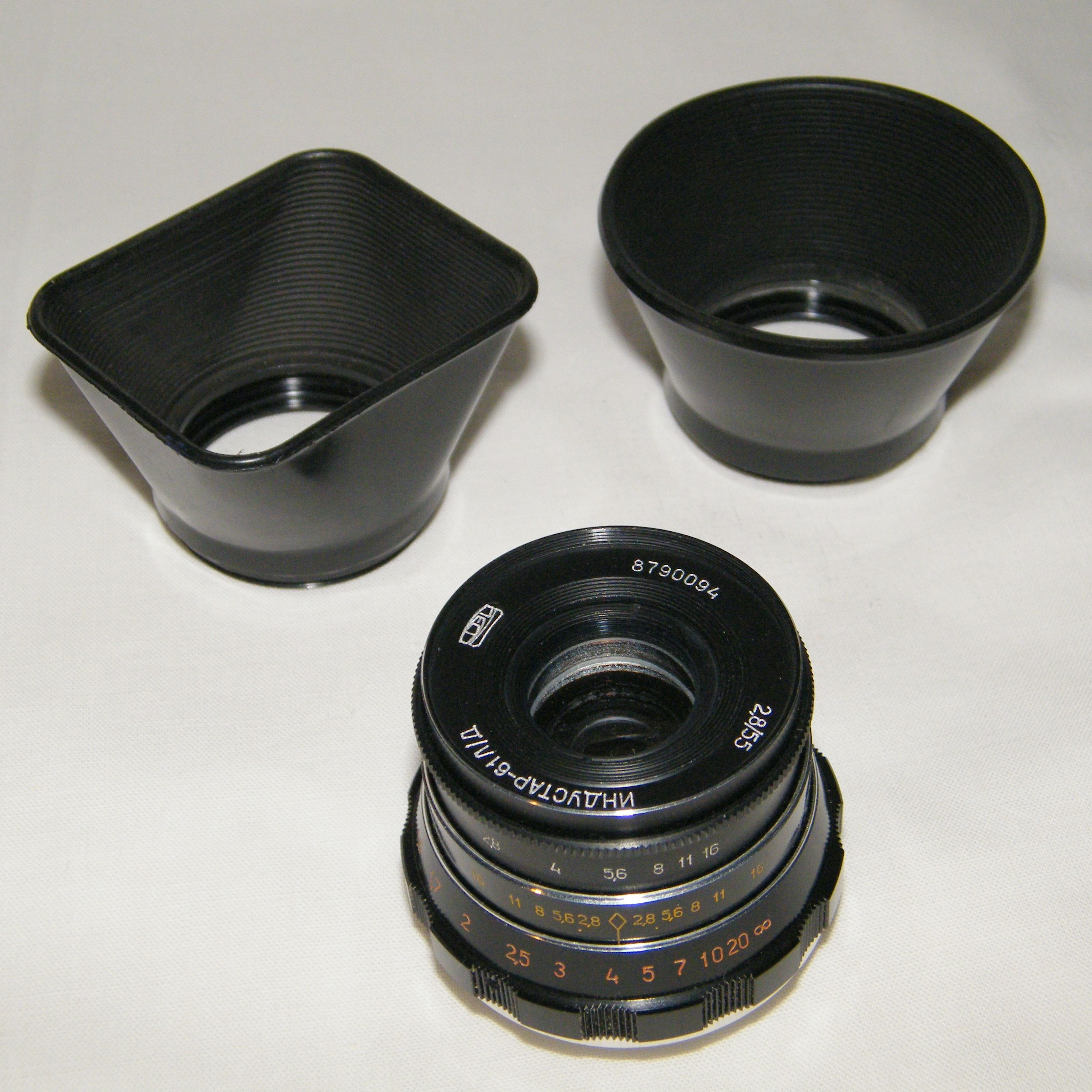 Объектив Индустар-61 Л/Д производства ФЭД и бленды к нему конической и пирамидальной формы.